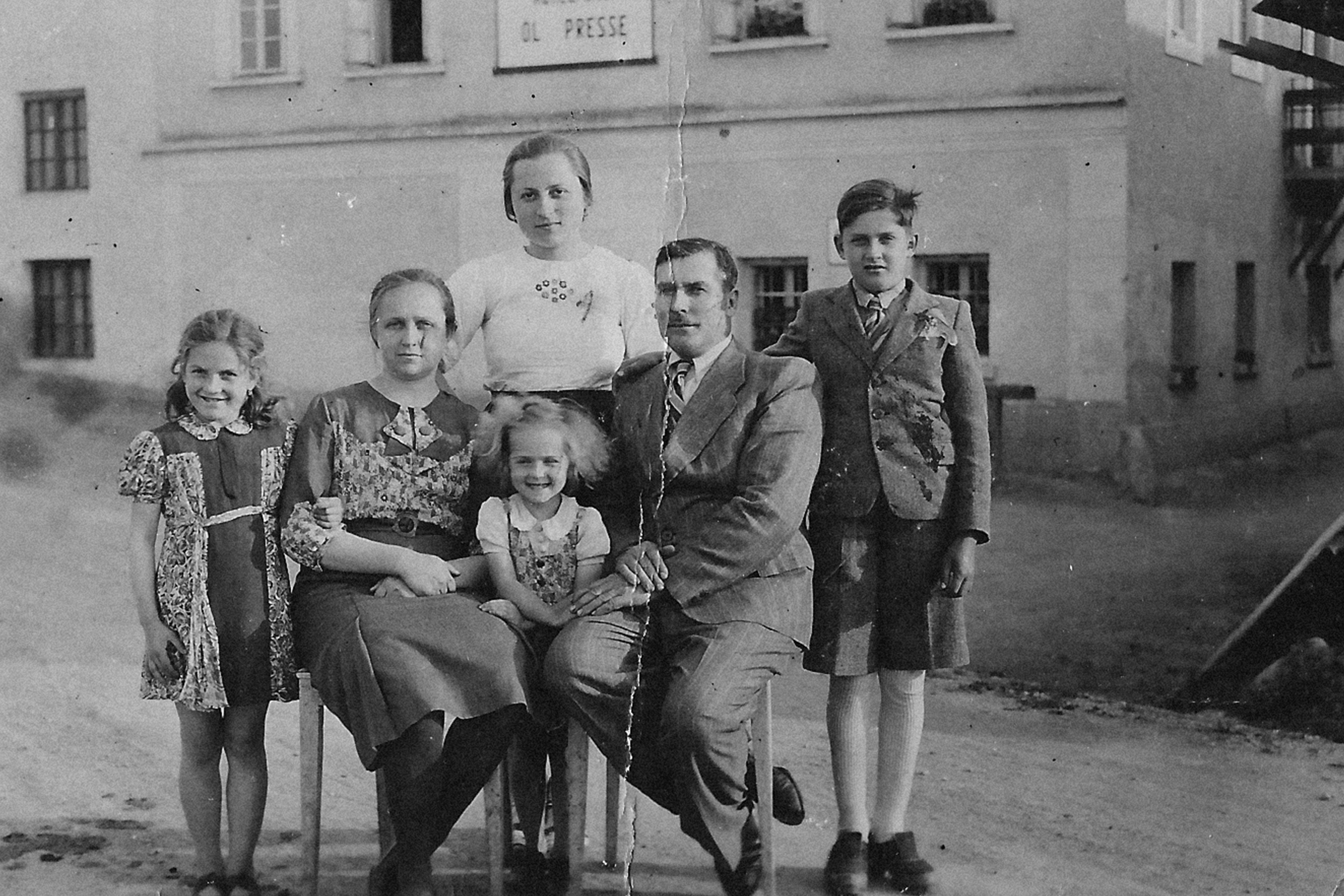 Družinska fotografija družine Kocbek - Oljarna Kocbek (eden izmed prvih oljarjev na Slovenskem)